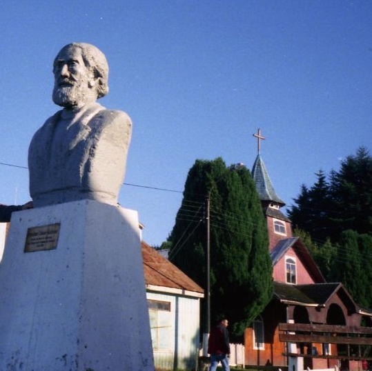 Buste de Francisco Coloane, sur la place de Quemchi, son village natal de Chiloe, Chili. Recadrage d'une photo prise personellement.